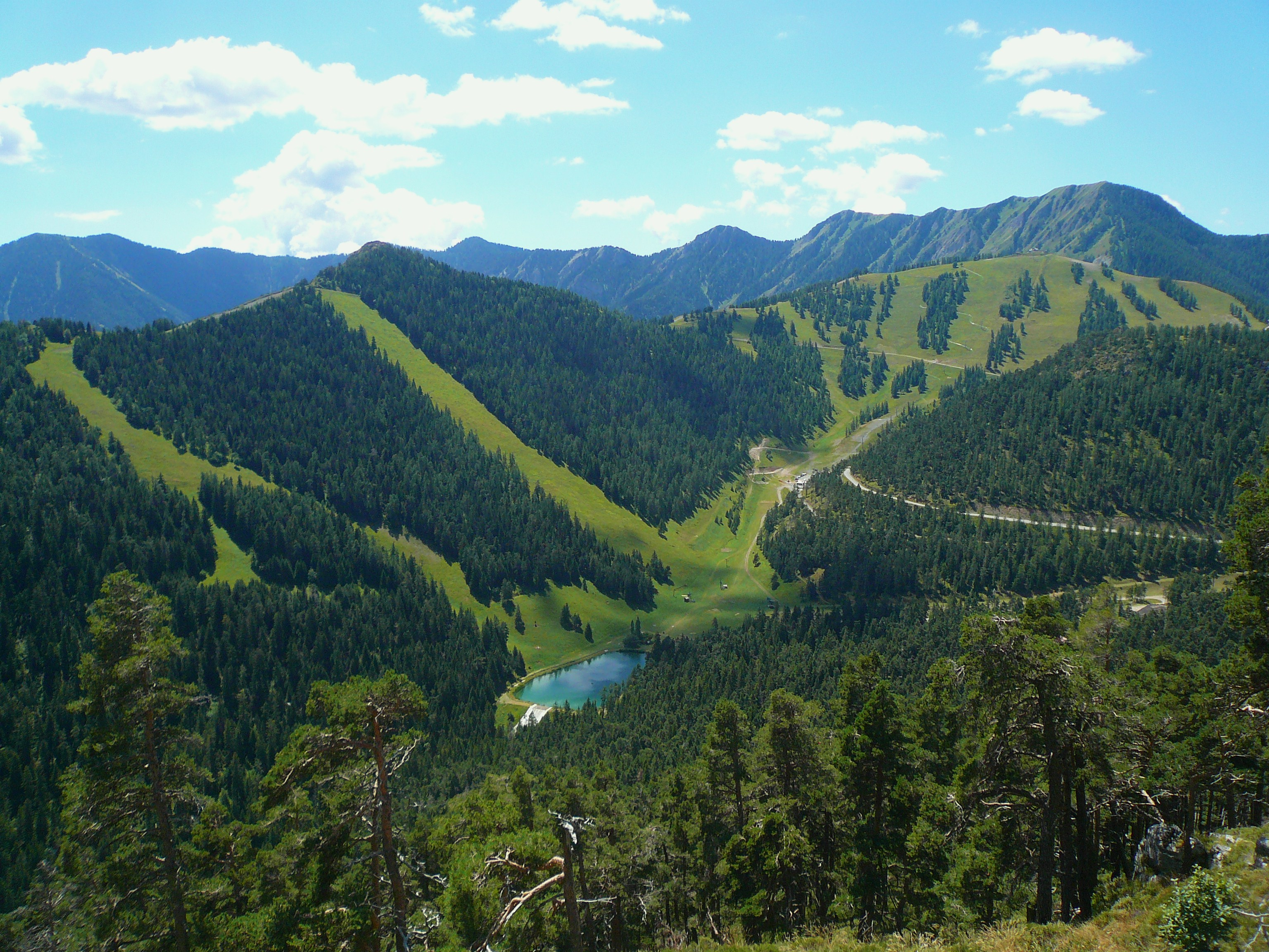 La Colmiane Ski resort